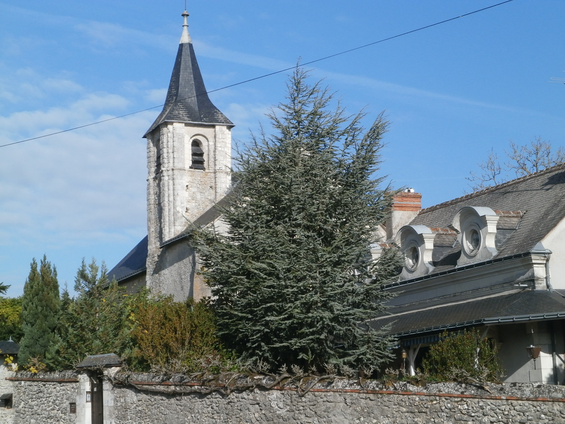 L'église